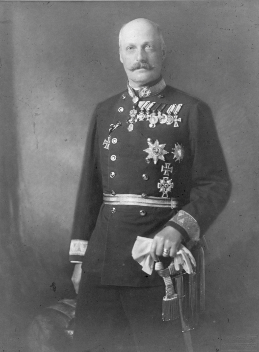 Erzherzog Leopold Salvator von Österreich-Toskana.